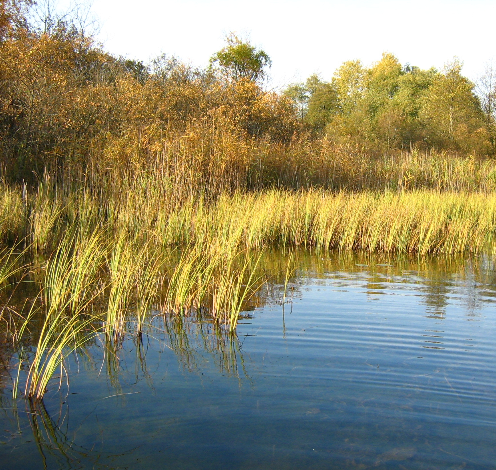 Szuwar turzycowy i trzcinowy na brzegu Jeziora Zawadzkiego (Poj. Ełckie)